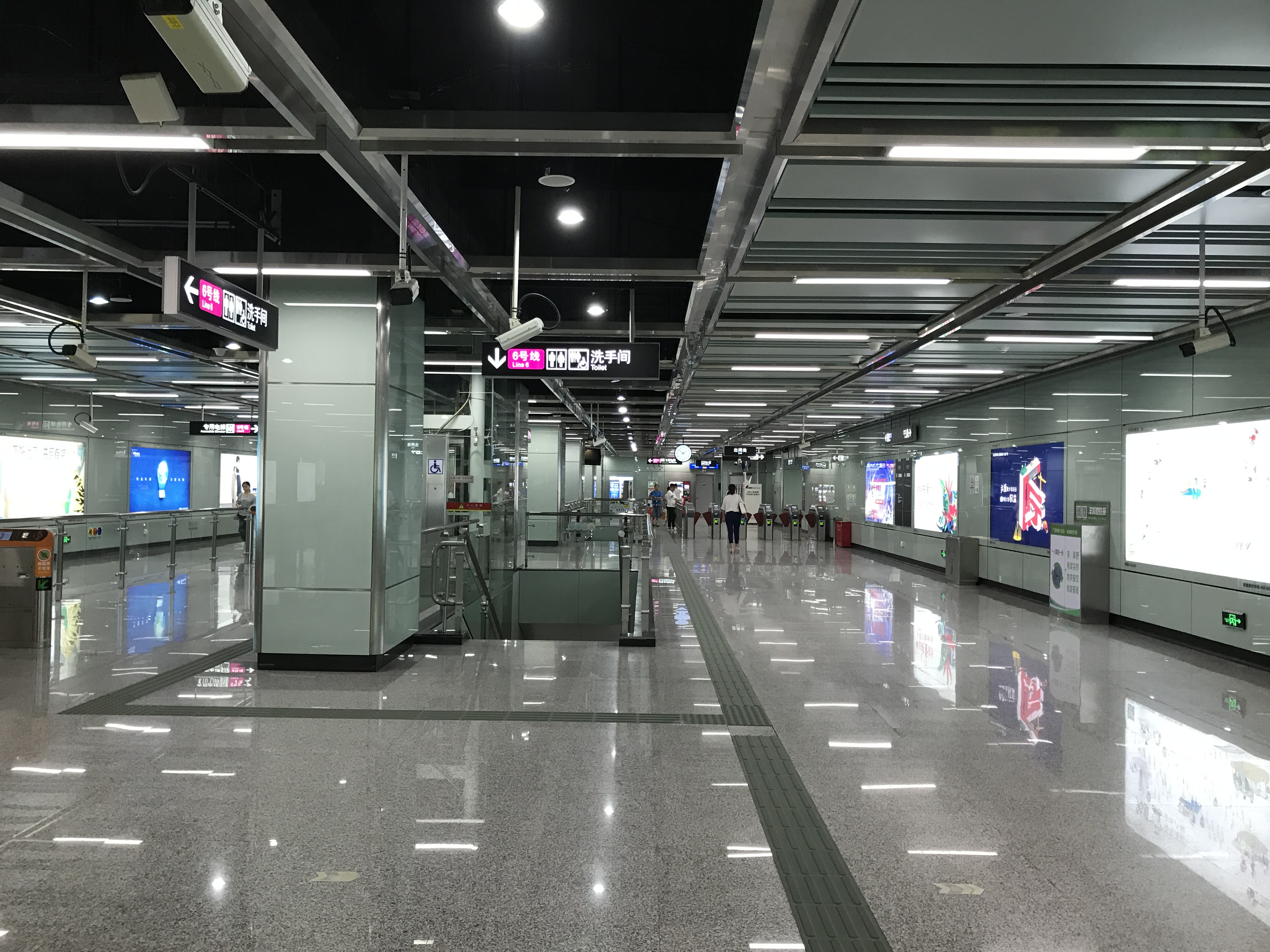 广州地铁高塘石站